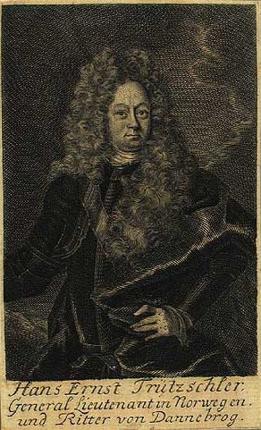 Hans Ernst von Tritzschler (1647-1718), Danish general